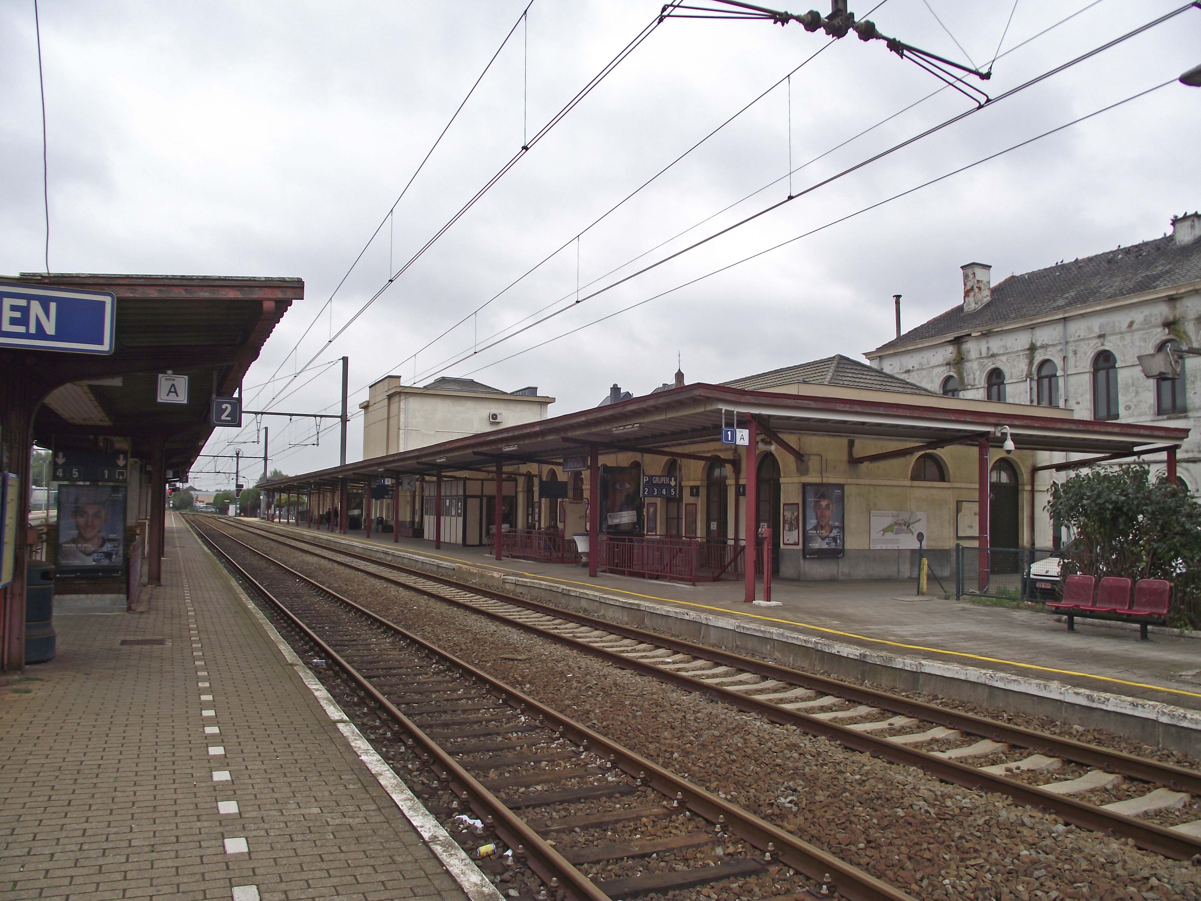 Stationgebouw gezien vanaf de perrons.